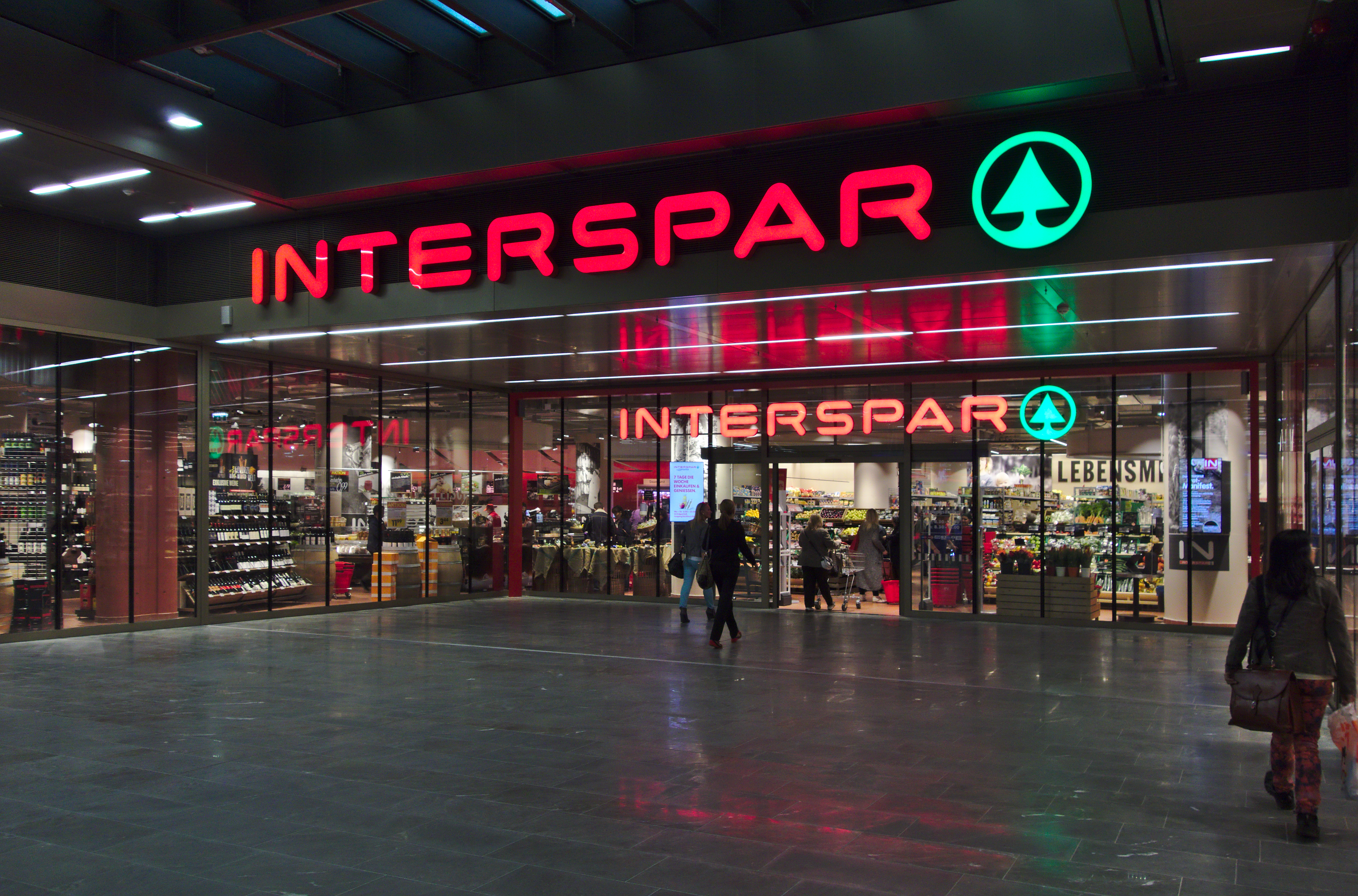 Wien Hauptbahnhof